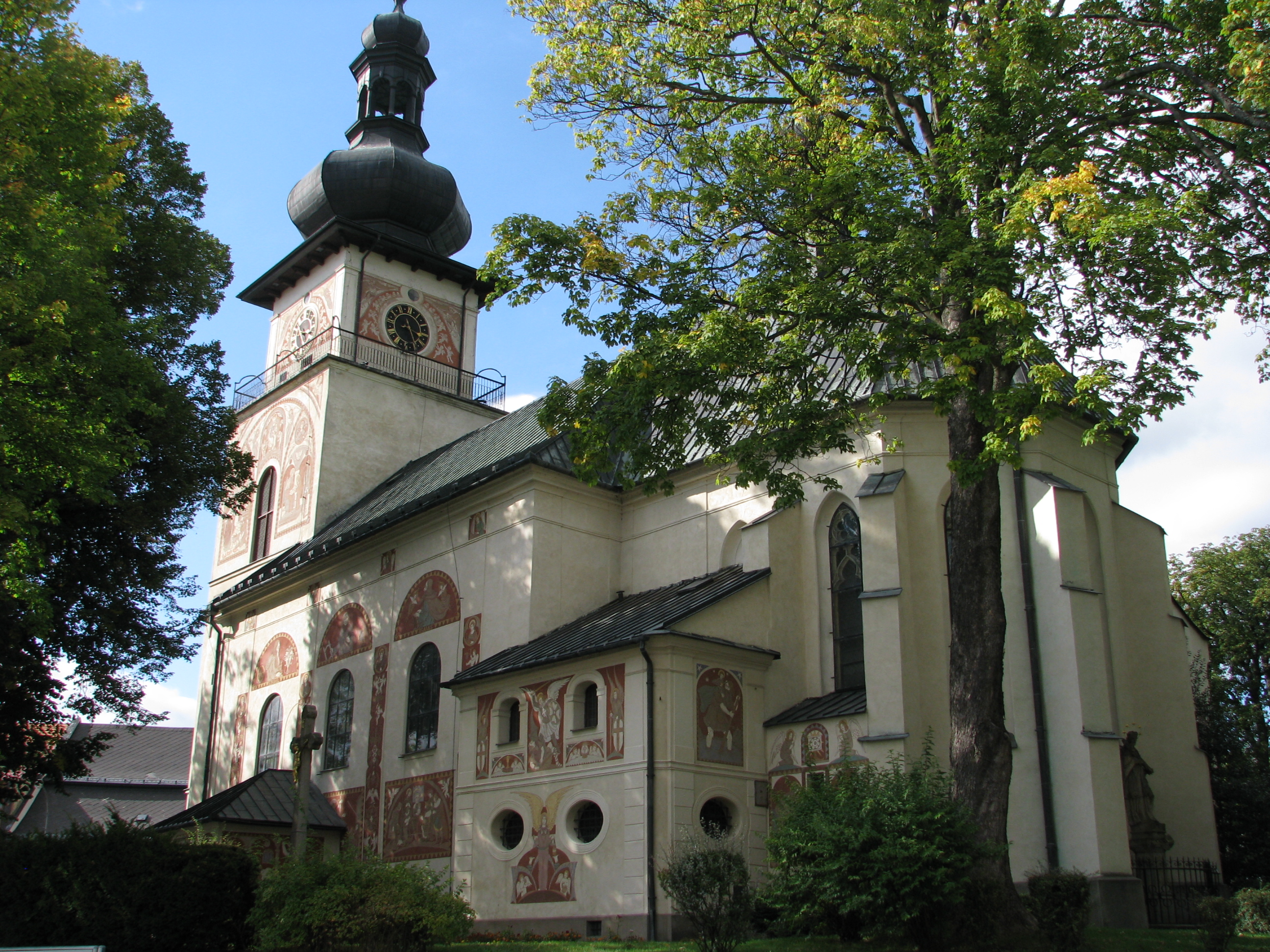 Kostel svaté Kunhuty, Nové Město na Moravě